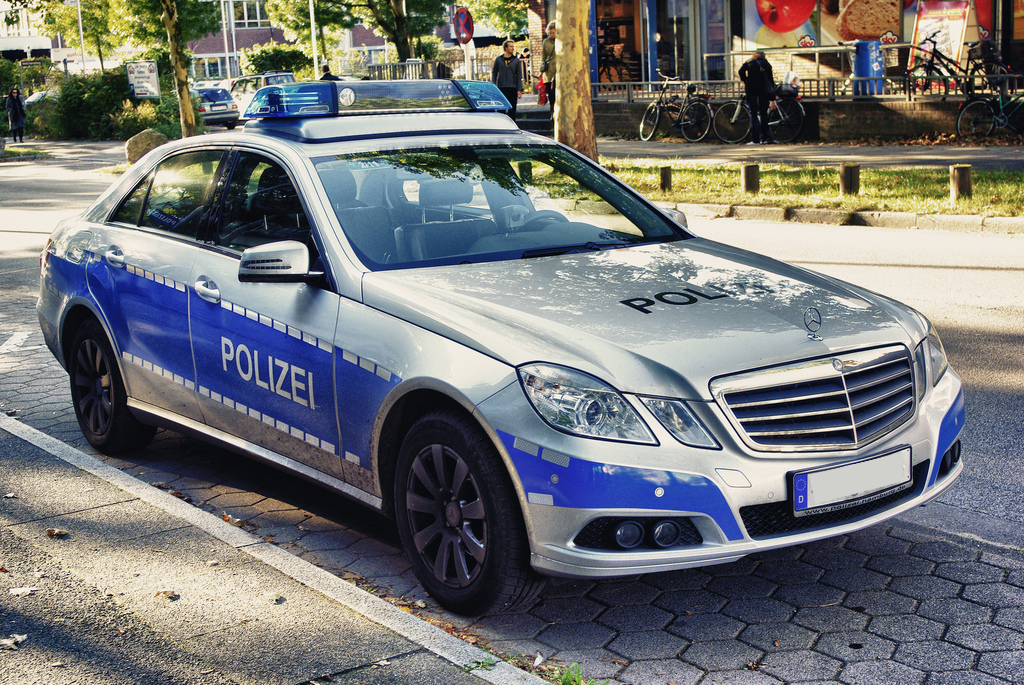 Einsatzfahrzeug der Polizei Hamburg, Mercedes-Benz W 212